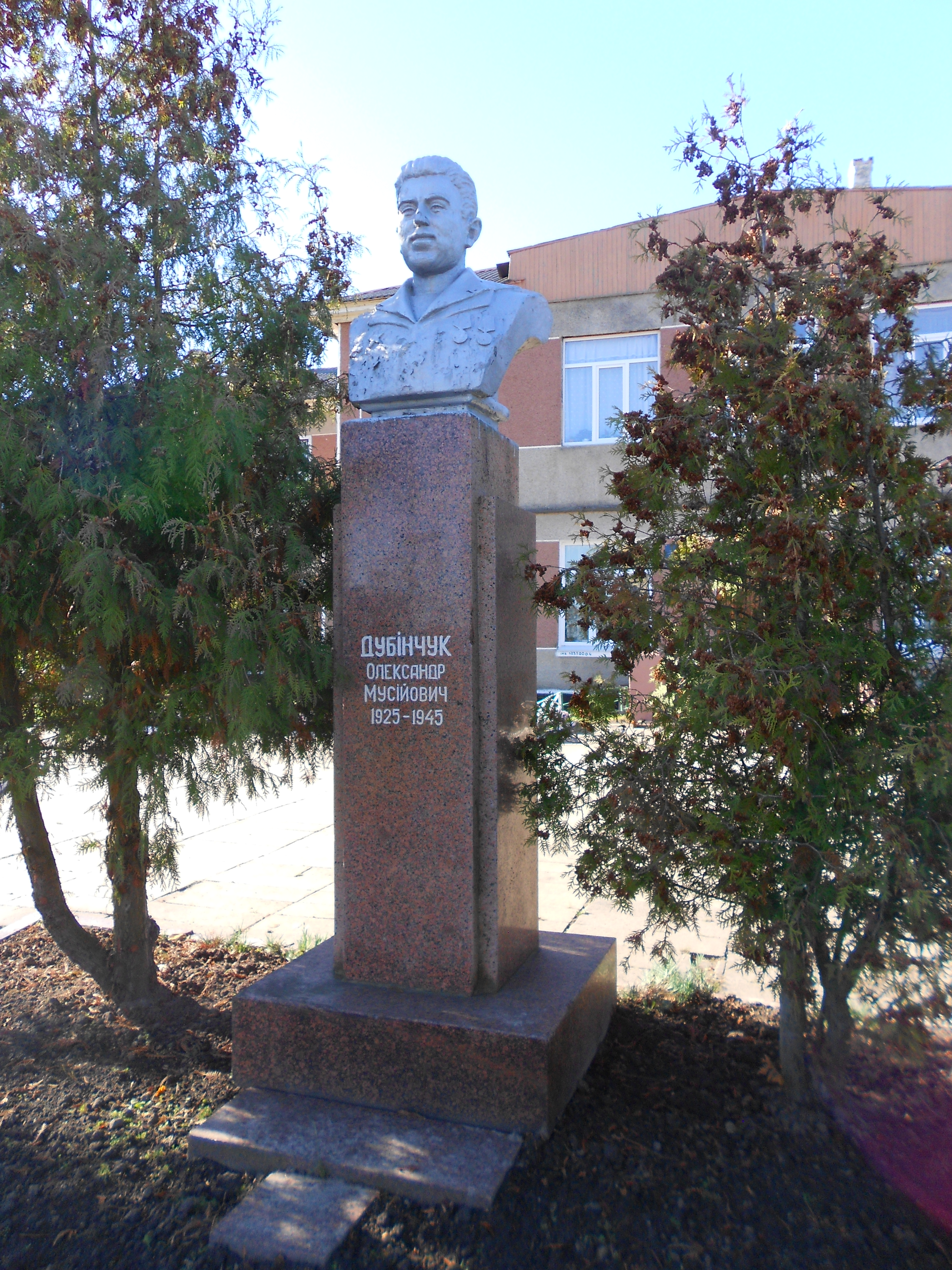 Друга Вікіекспедиція до Коростенського району. Пам’ятник у с. Лісівщина, Коростенського району.